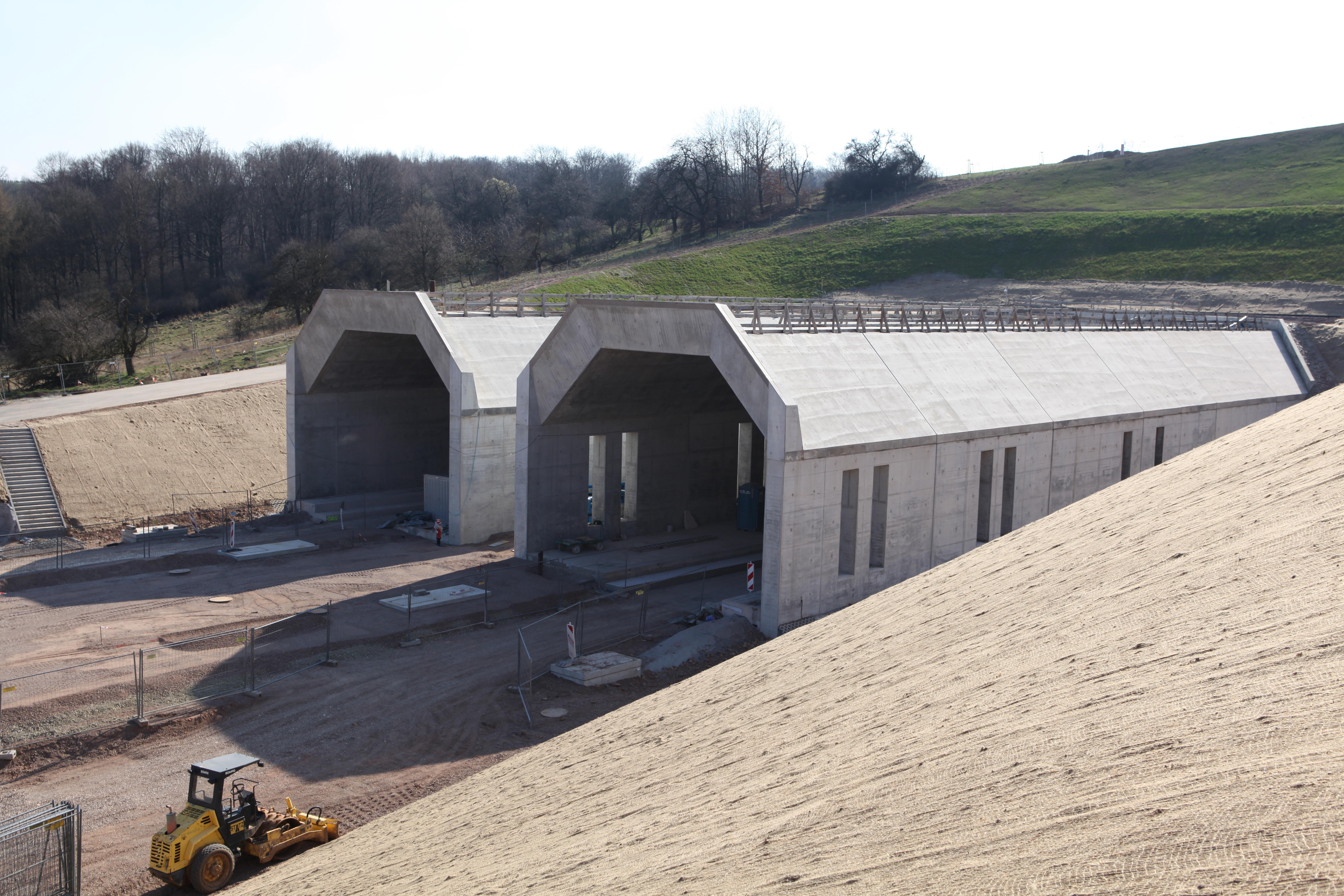 Ostportal des Finnetunnels bei Saubach in Sachsen-Anhalt